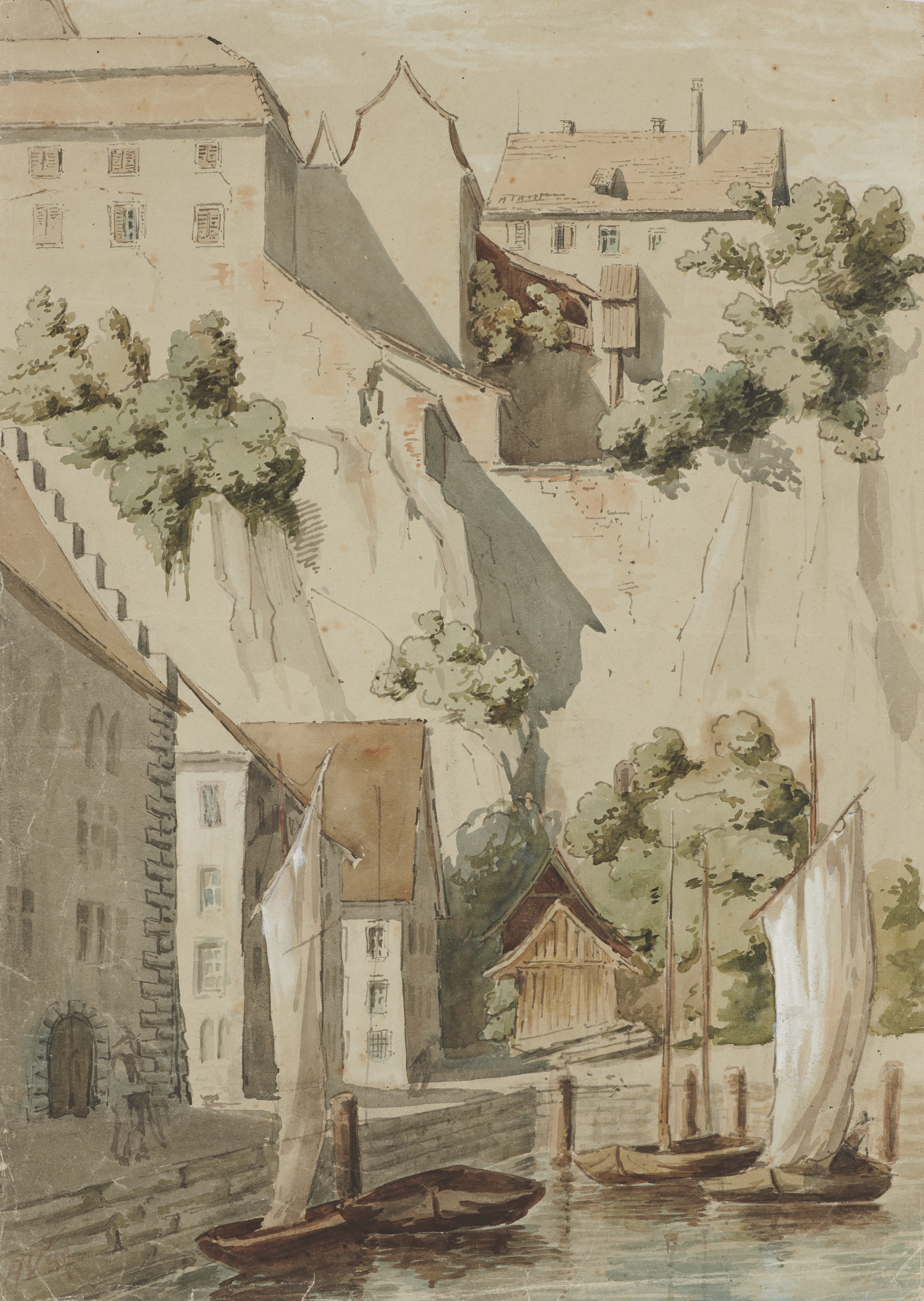 Amalie Vanotti: Meersburg, Blick auf Felsen und Oberstadt,1891; Aquarell auf grünlichem Papier, 44,6 × 31,5 cm; (auf Bild beschnitten)